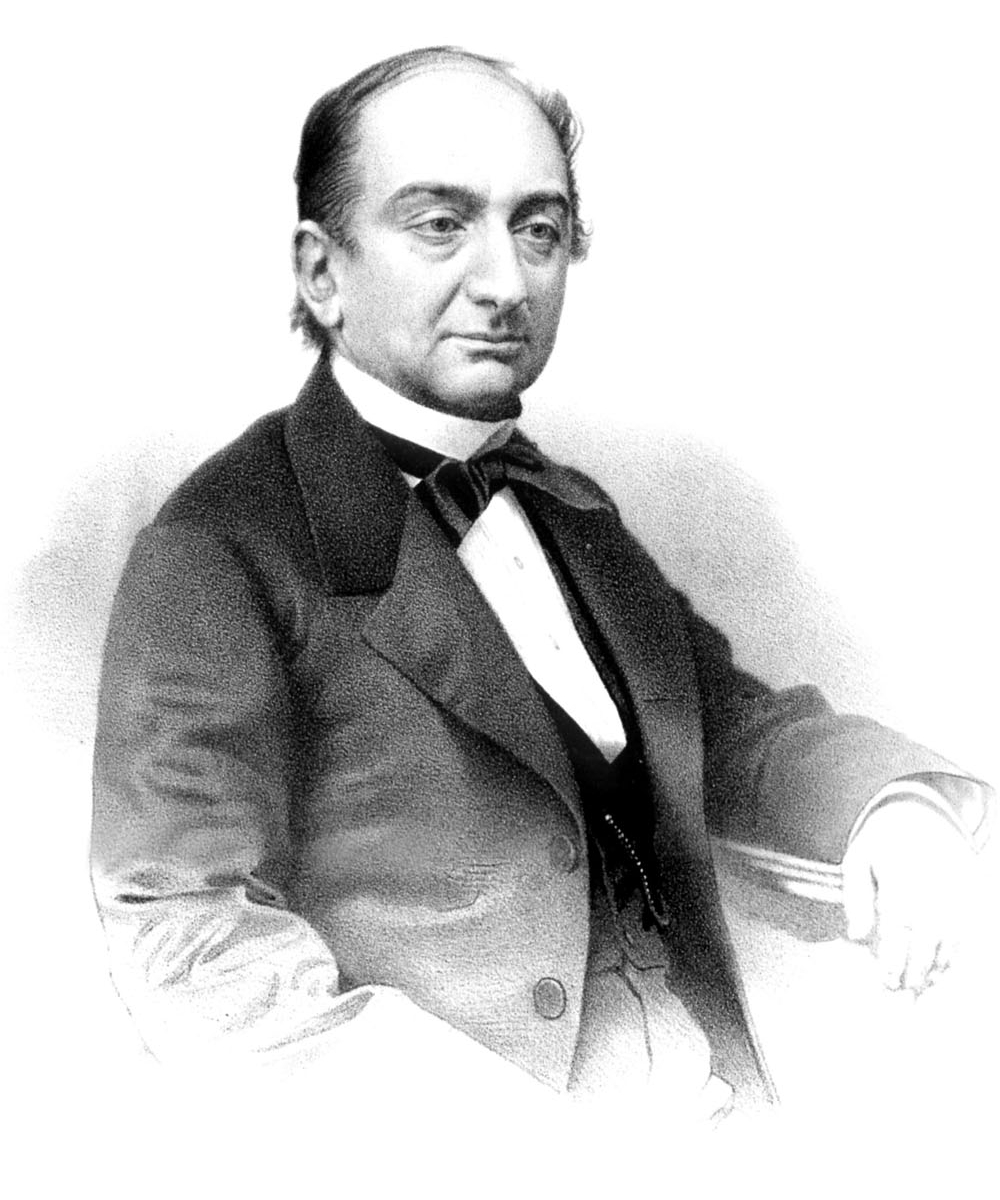 Делянов И. Д.